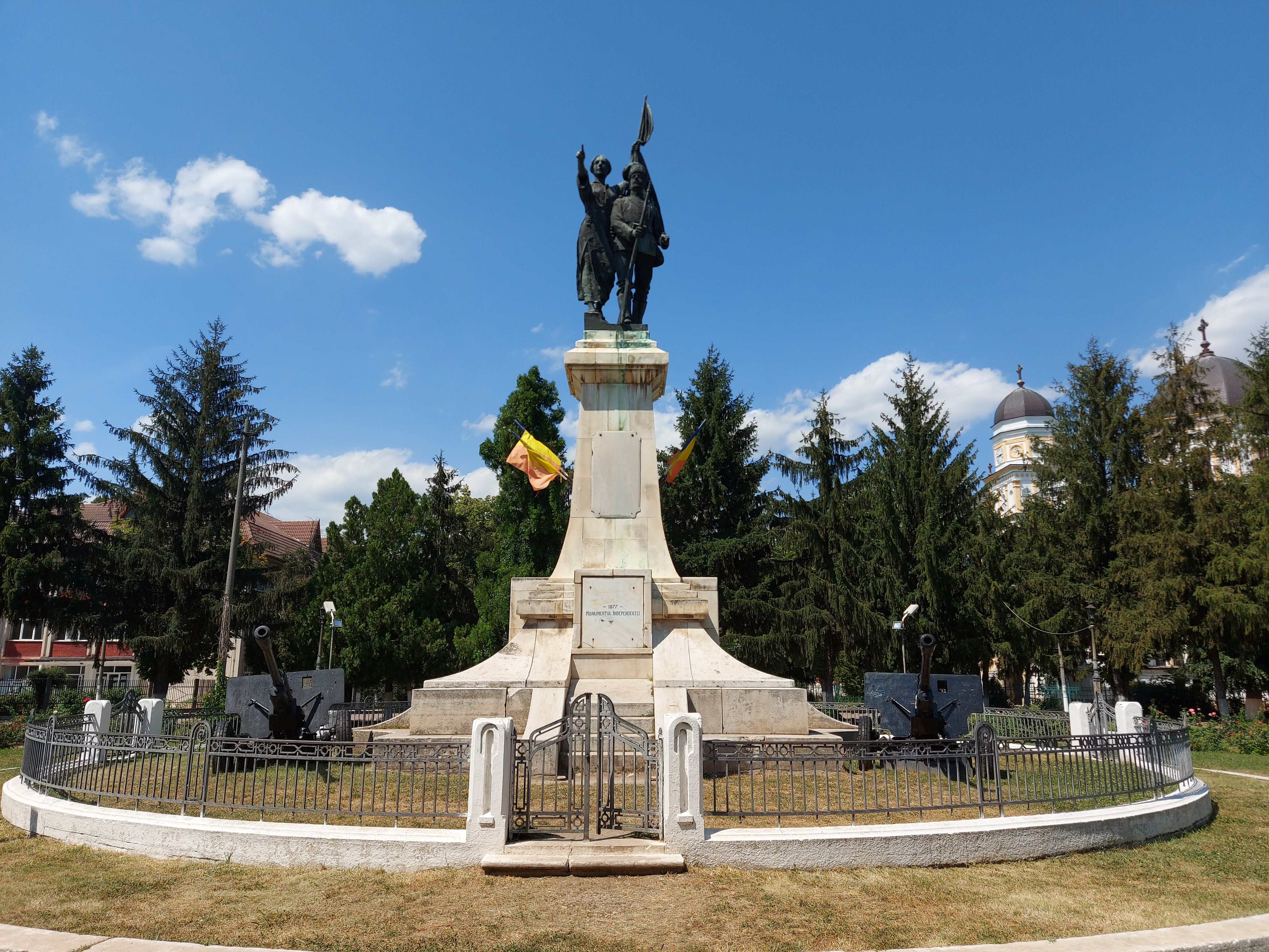 Monumentul Independenței din 1877. Acesta se află în județul Olt, România.